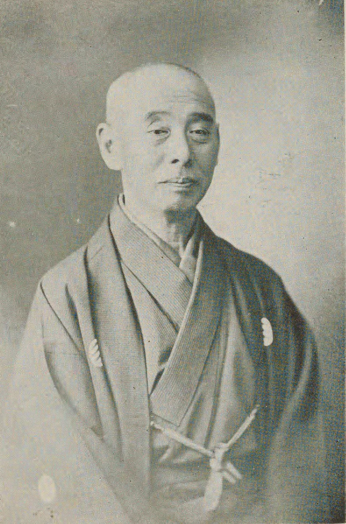 晩年の平岡凞